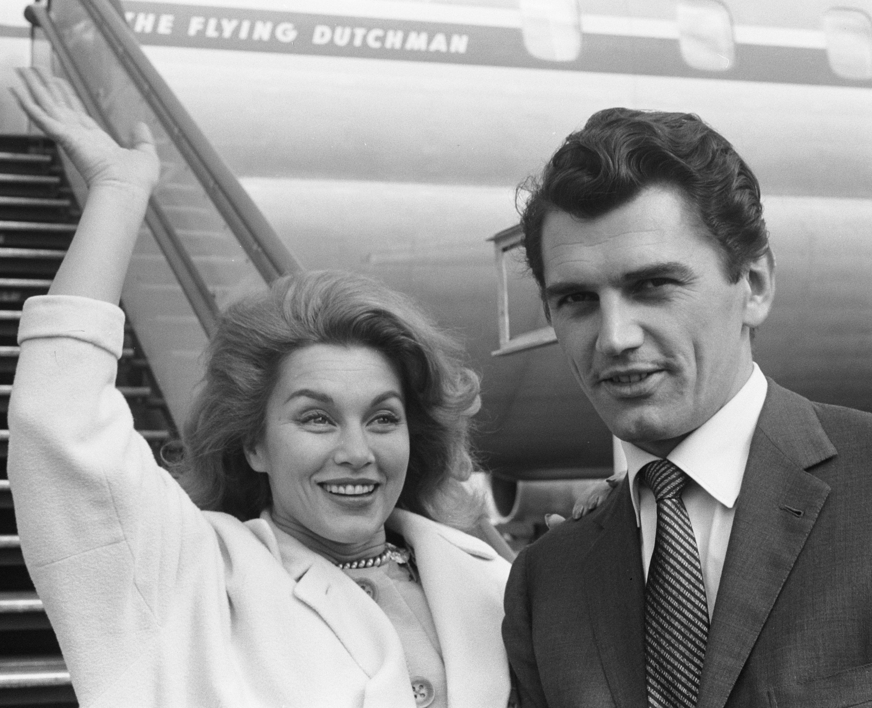 Linda Christian (actrice) en echtgenote Edmund Prudan bij aankomst op Schiphol